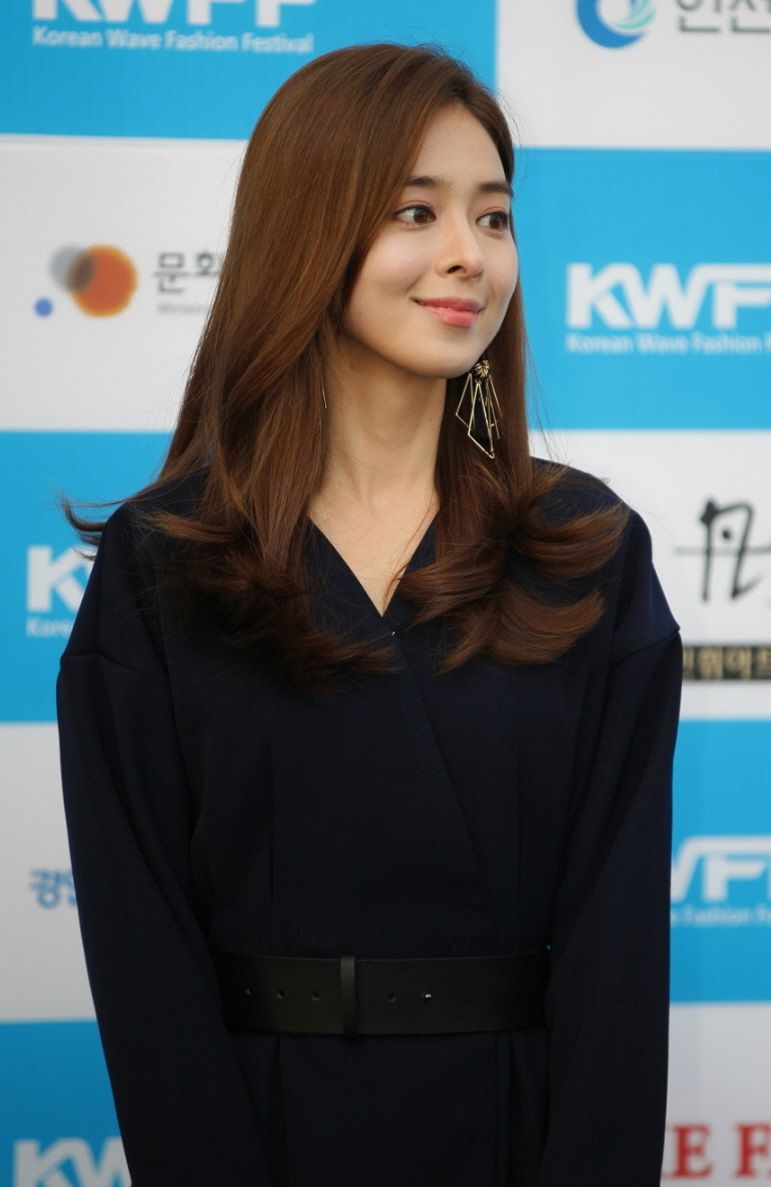 임은경 2015 한류패션페스티벌 (Korean Wave Fashion Festival) 포토존